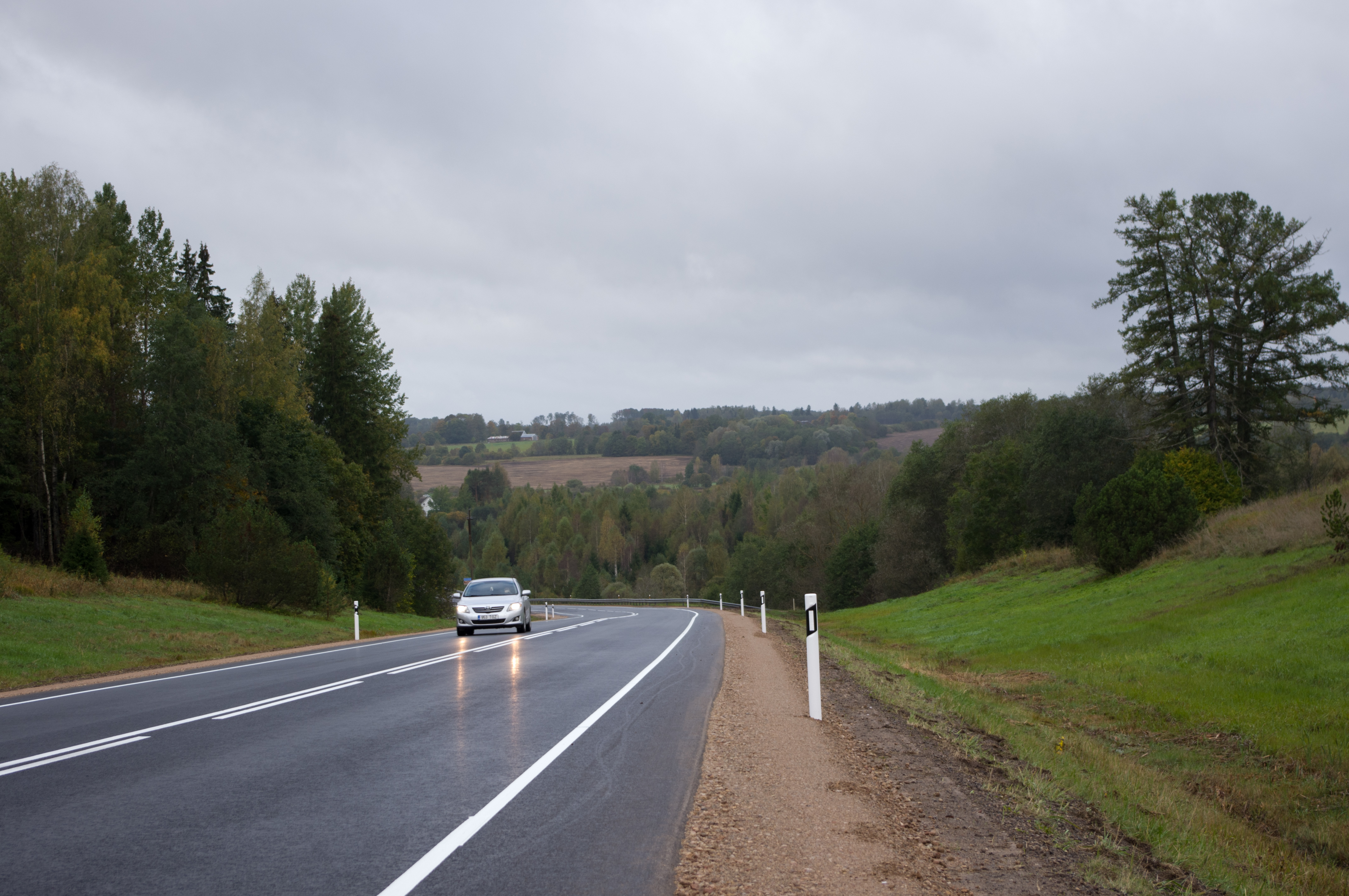 Vaade Raudna mäelt Päri külas, 2014